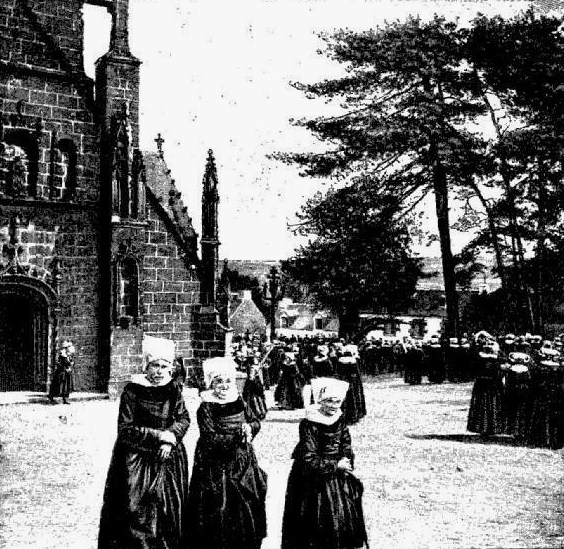 Pardon de Rumengol le jour de la Trinité en 1903 sur la commune de Faou dans le département français du Finistère.